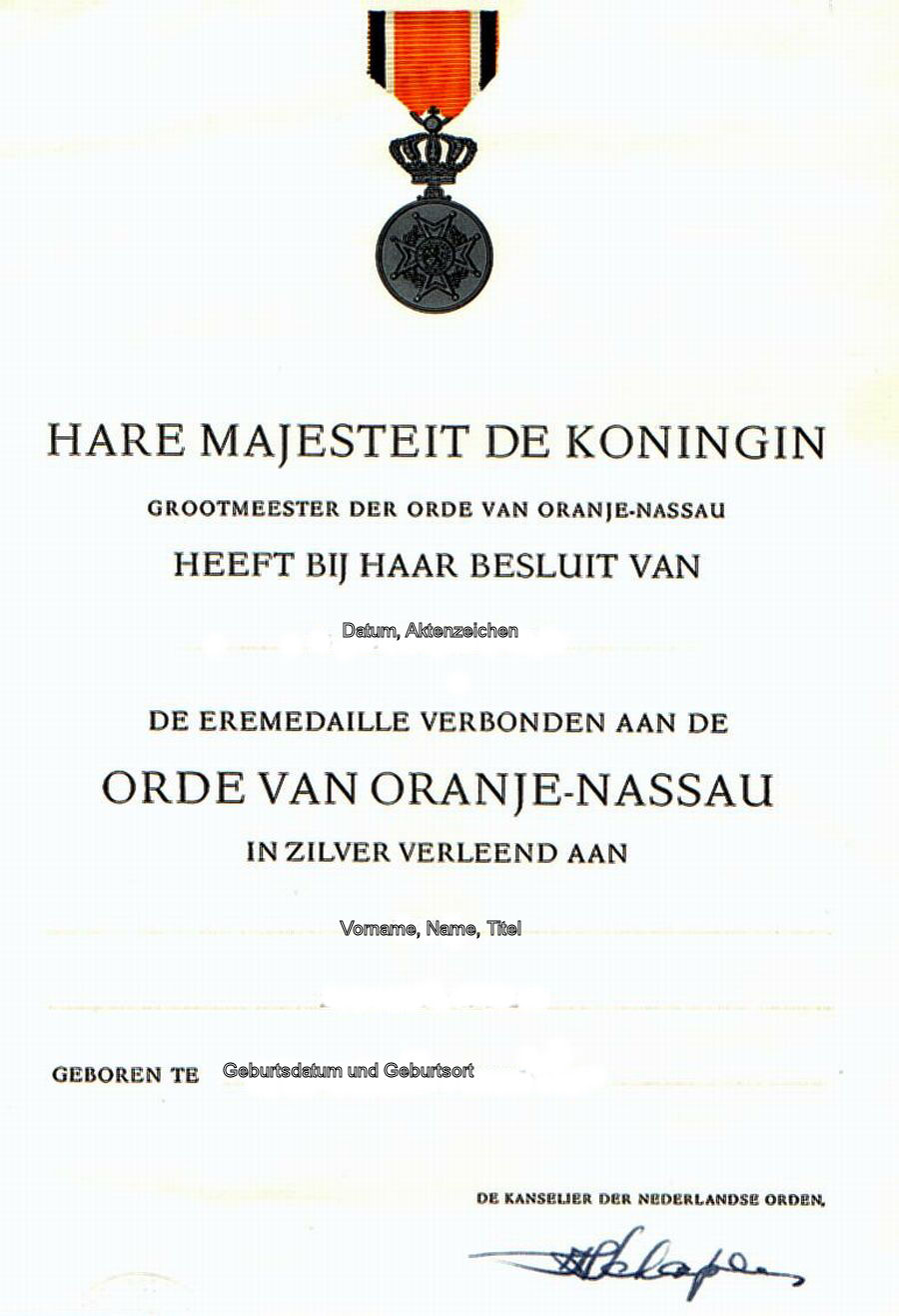 Fotografie einer Urkunde anlässlich der Verleihung des niederländischen Orde van Oranje-Nassau im Rang eines Ritters (Name, Geburtsdatum, Verleihungsdatum und Aktenzeichen aus Datenschutzgründen entfernt)